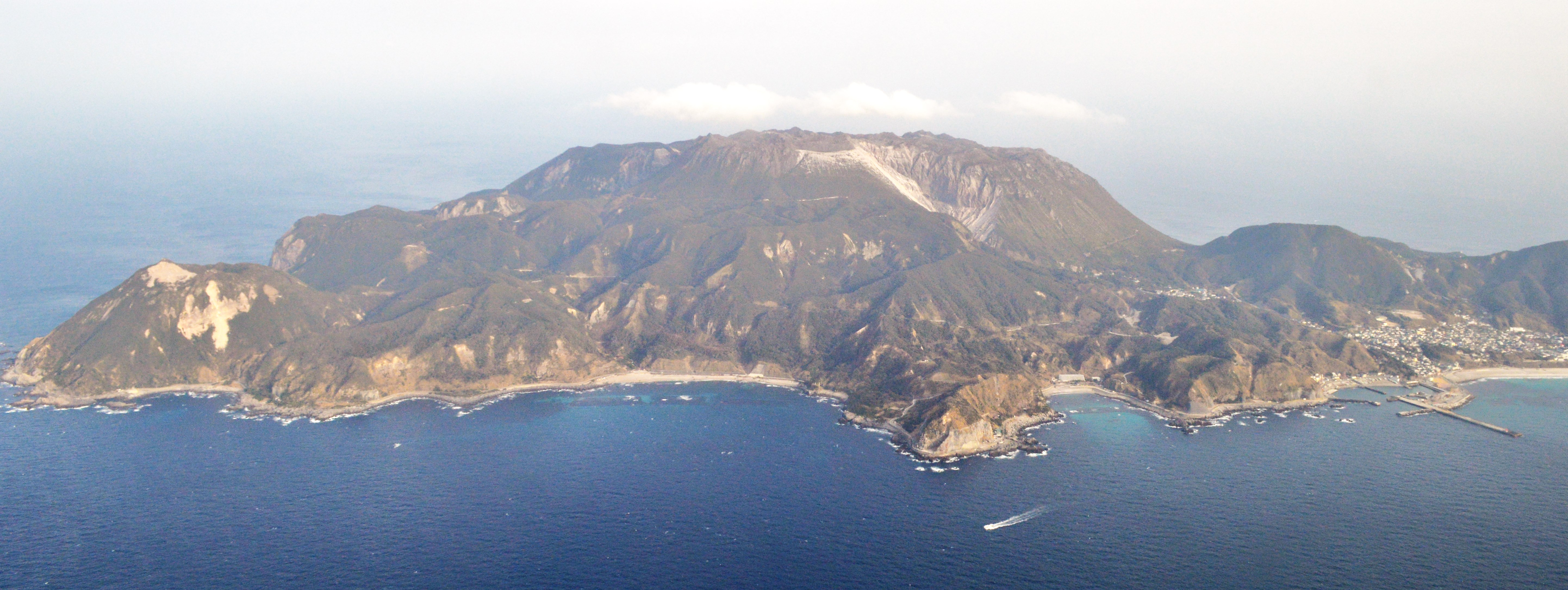 神津島全景 (空撮)